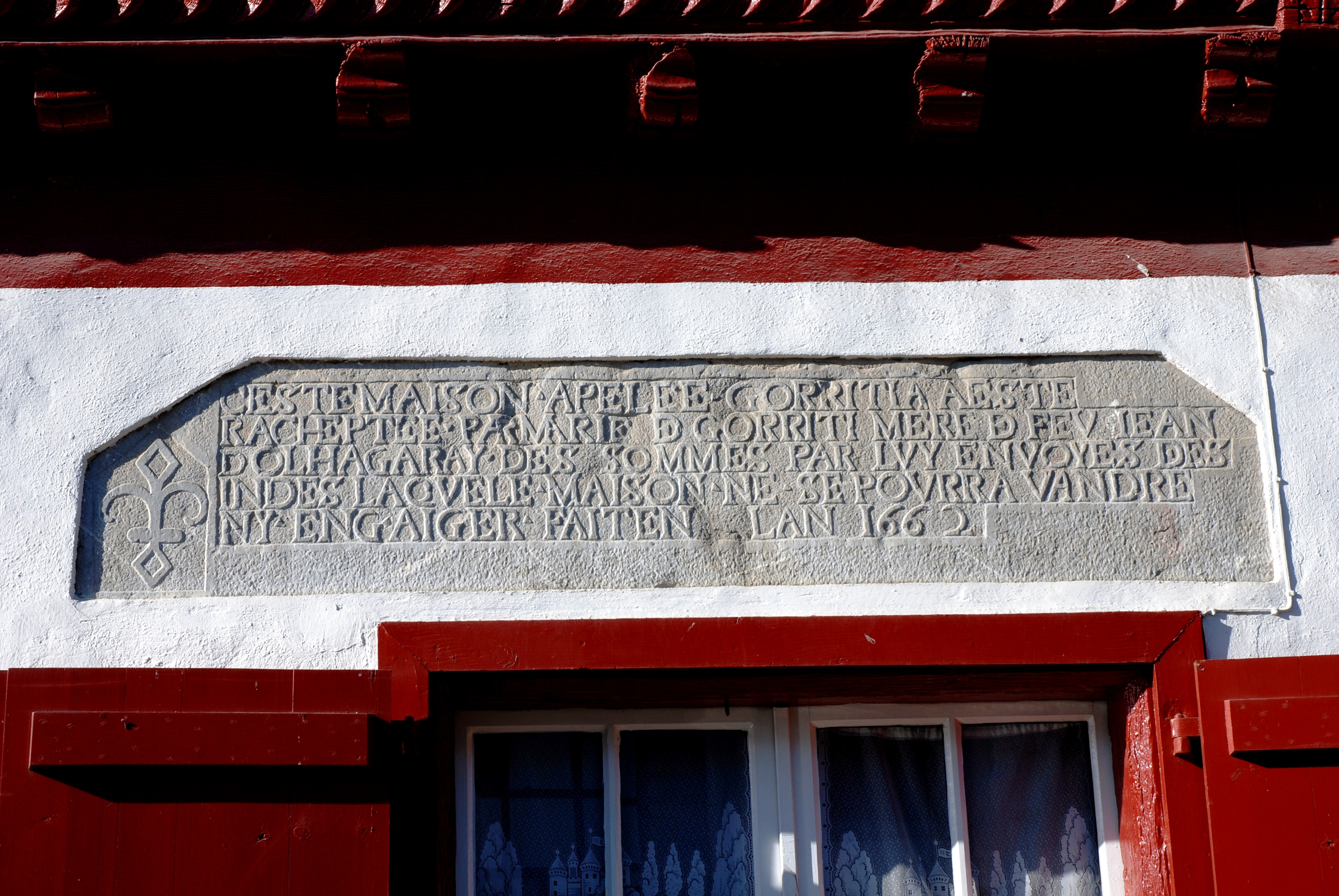 Ainhoa, linteau sculpté